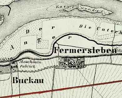 Ausschnitt aus der Karte Albrecht Platts von 1841, Fermersleben, oben (Osten) ist noch die Insel Katzenwerder in der Elbe vorhanden, die Sülze befindet sich noch im ursprünglichen Bachbett, die Salbker Seen sind nicht vorhanden, links (Norden) liegt Buckau mit der bereits vorhandenen Maschinenfabrik Buckau, unten (Westen) verläuft die Eisenbahnlinie, der am Nordende Fermerslebens nach Westen verlaufende Weg dürfte die heutige List-Str. sein